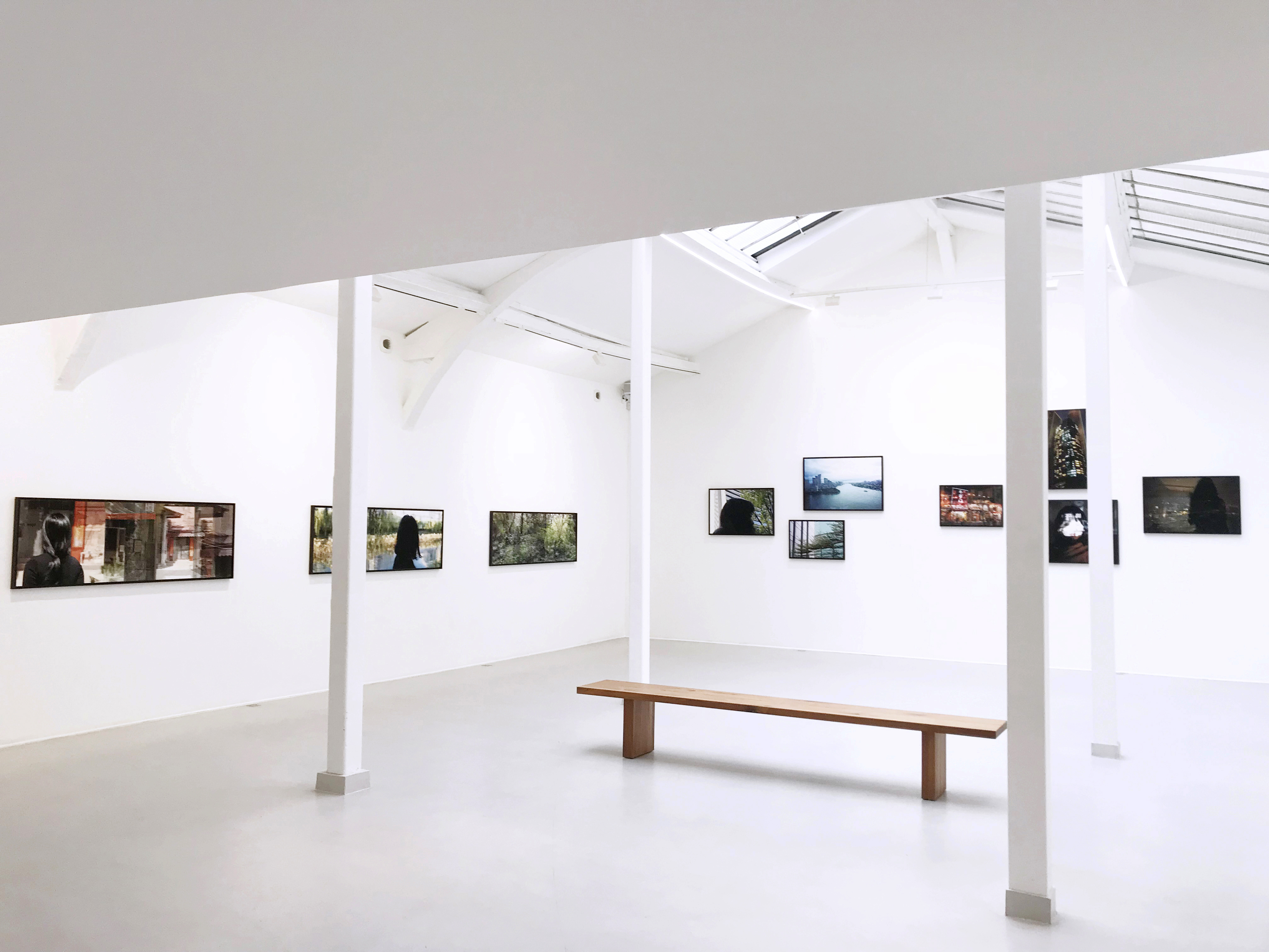 Exposition China Drifting, Catherine Gfeller, Galerie RX, PAris 2018